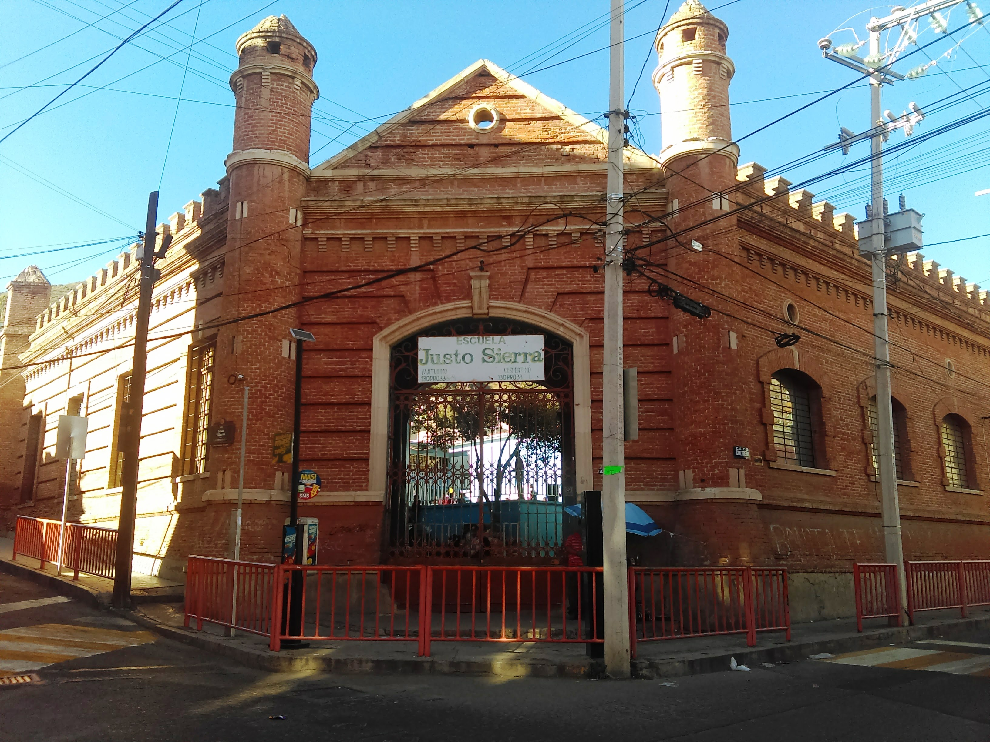 Escuela Primaria Justo Sierra en Pachuca, México.